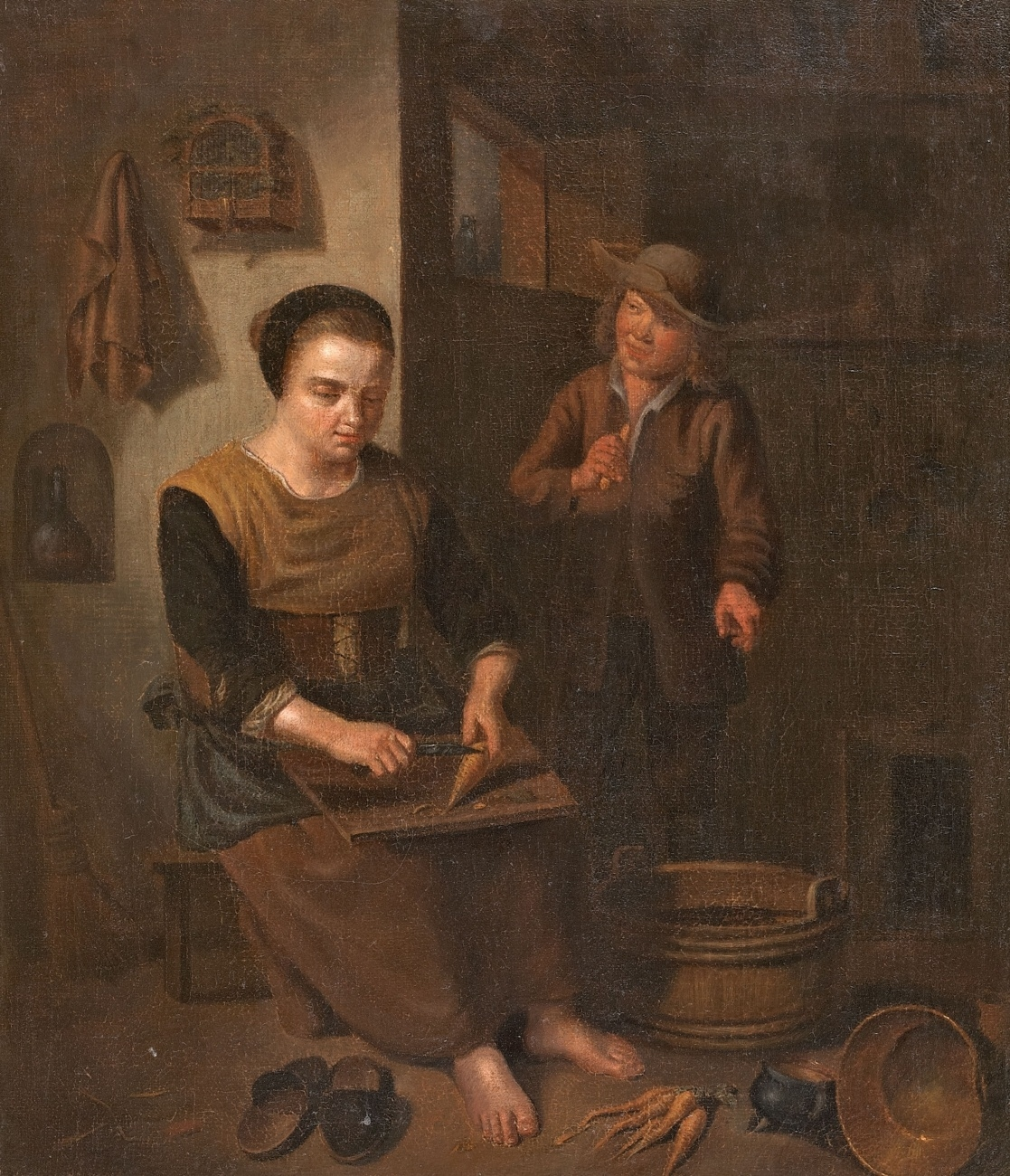 Kücheninterieur mit Frau und Kind.